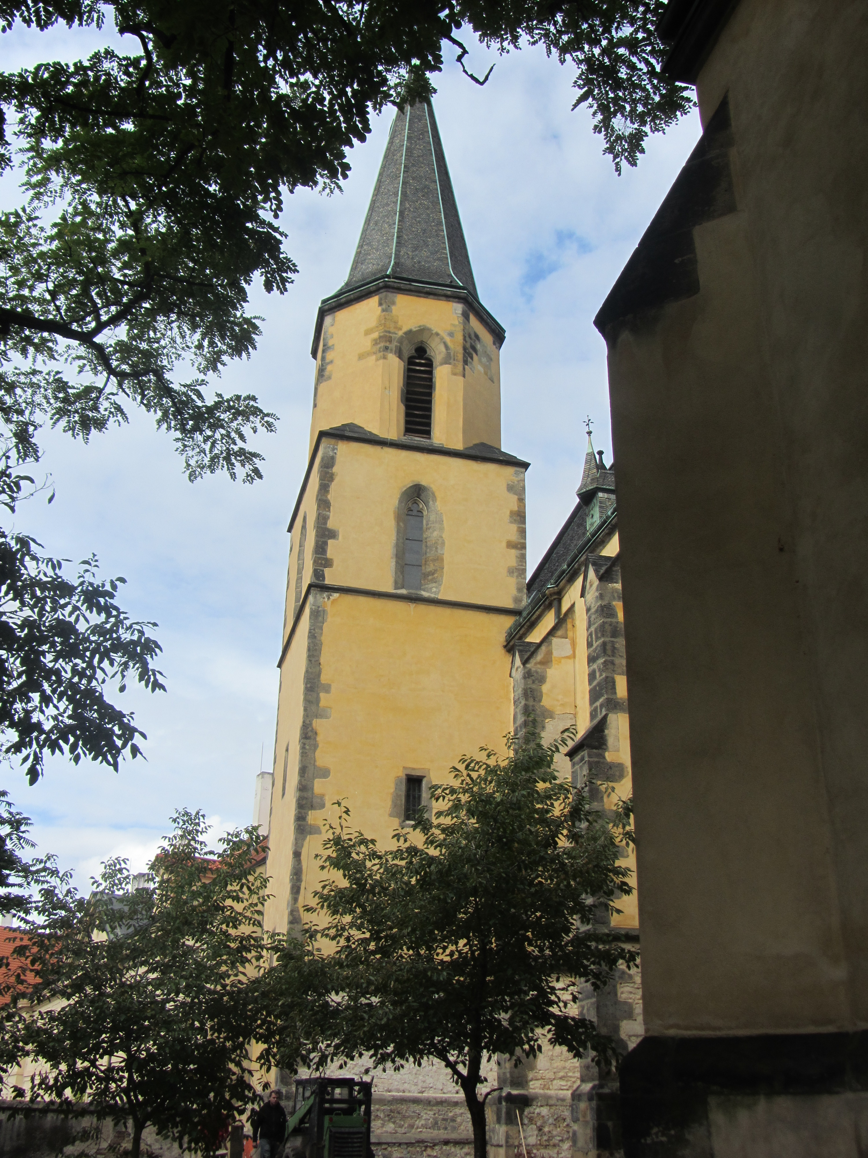 Pohled na exteriér věže z východní strany